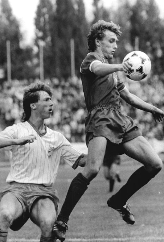 ADN-ZB-Oberst-12.8.89-B-Berlin: Fußball-Oberliga-1. Runde-BFC Dynamo - Fc Rot-Weiß Erfurt 2:2 (2:1)- Zu den besten Spielern der Begegnung gehörte Thomas Doll (r.-BFC), hier im Zweikampf mit Erfurts jungem Verteidiger Thomas Linke.